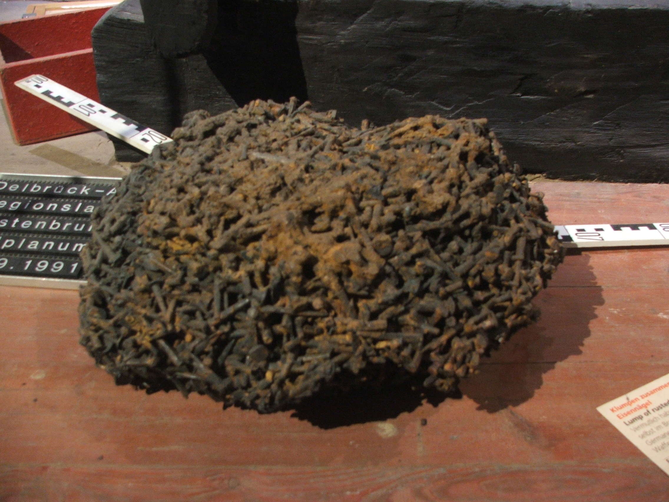 Westfälisches Museum für Archäologie: Holzbalken und ein Klumpen mit Nägeln aus dem Römerlager Anreppen.